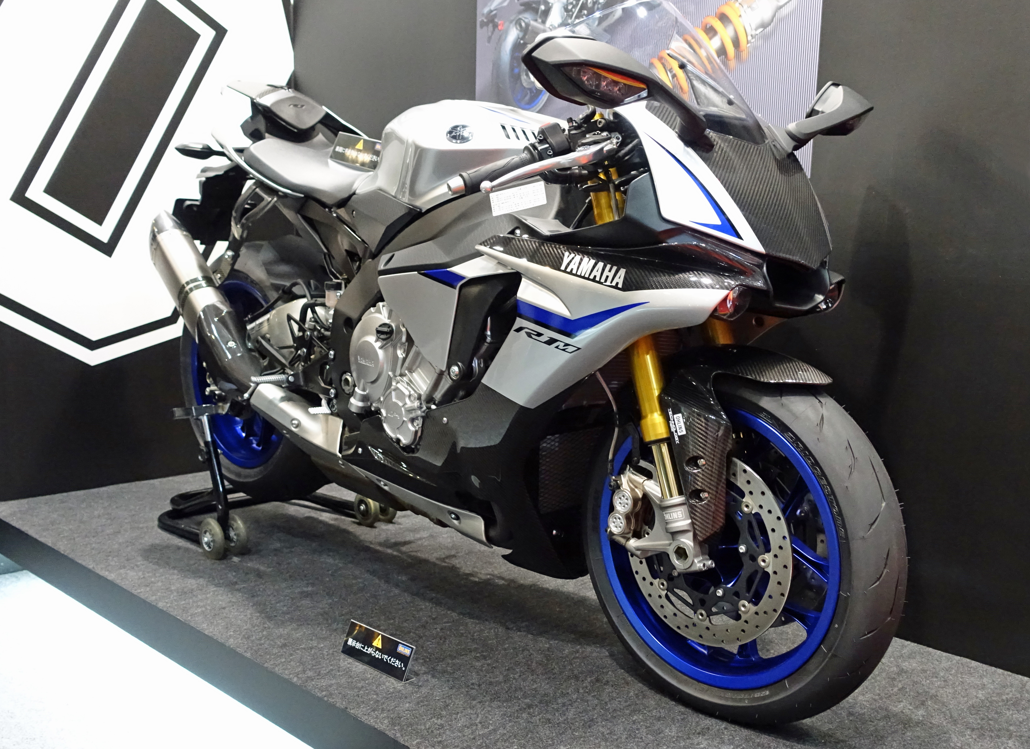 東京モーターショー2015で展示されていたヤマハ・YZF-R1M